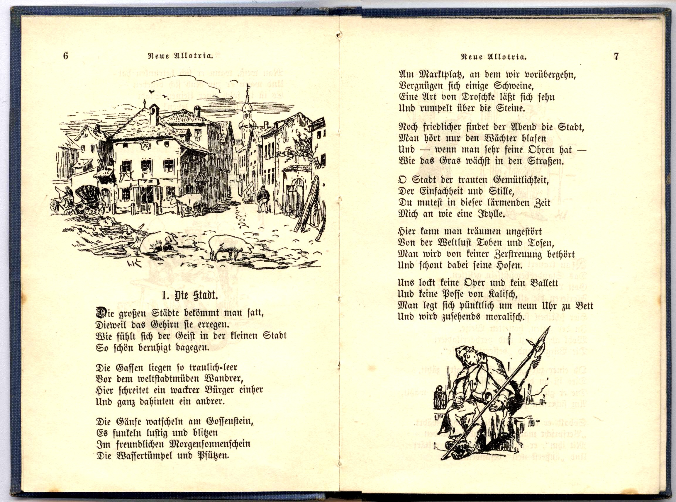 Seiten 6 und 7 des Buches "Neue Allotria" von Georg Bötticher